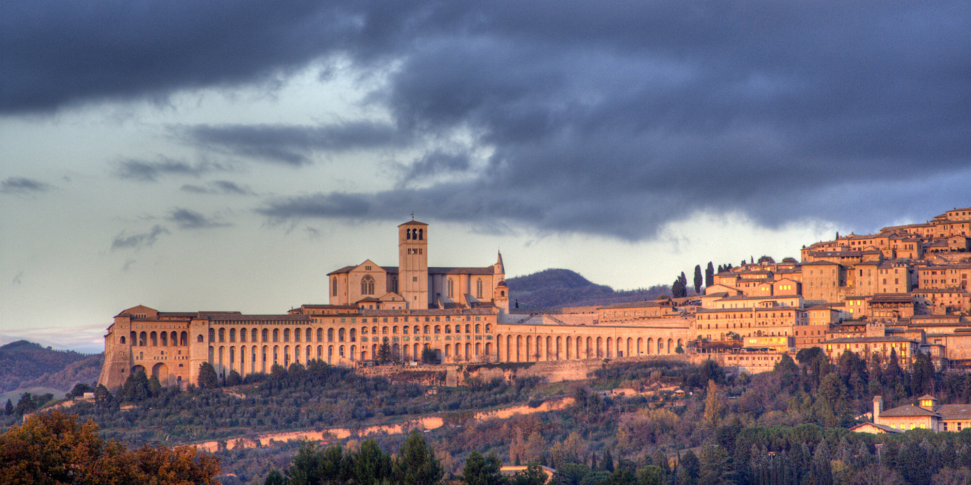 Assisi (PG)